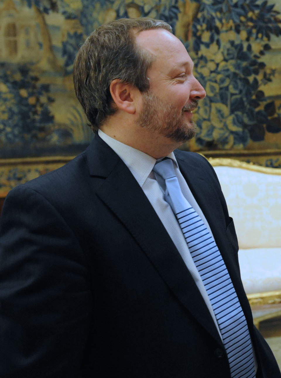 La presidenta Cristina Fernández encabezó un acto en el Salón de las Mujeres Argentinas de Casa Rosada donde entregó $ 521 millones en créditos del Programa del Bicentenario y rubricó el decreto por el cual se designa a Martín Sabbatella al frente de la Autoridad Federal de Servicios de Comunicación Audiovisual.